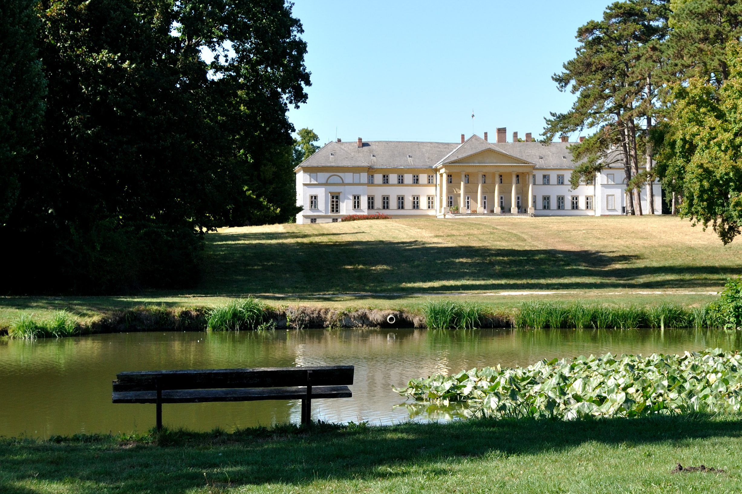 Festetics-kastély (Dég, Hunyadi János u. 11.) This is a photo of a monument in Hungary. Identifier: 3602